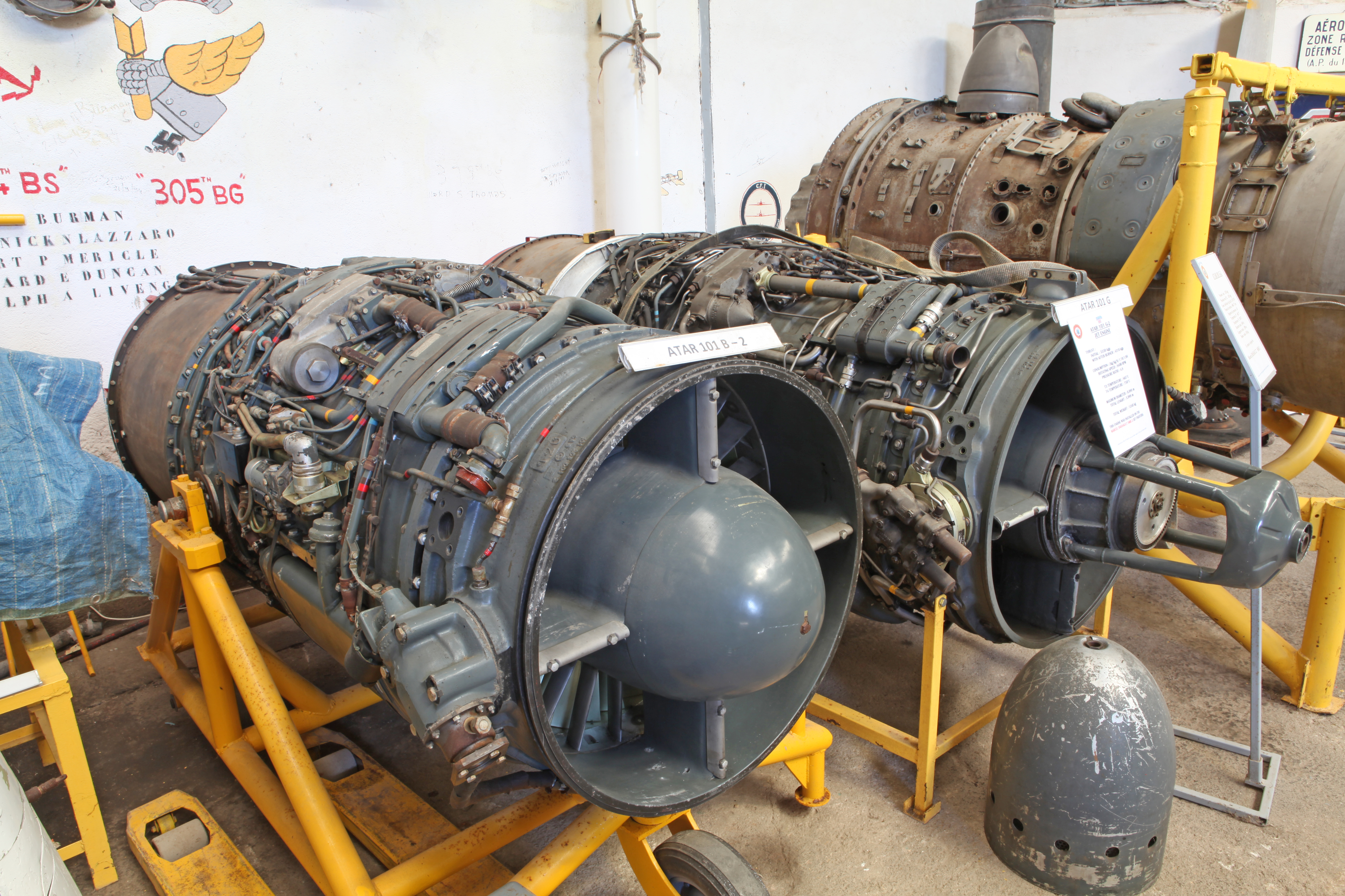 Atar 101 B-2 Jet Engine and Atar 101 G at Ailes Anciennes Armorique Vannes airport